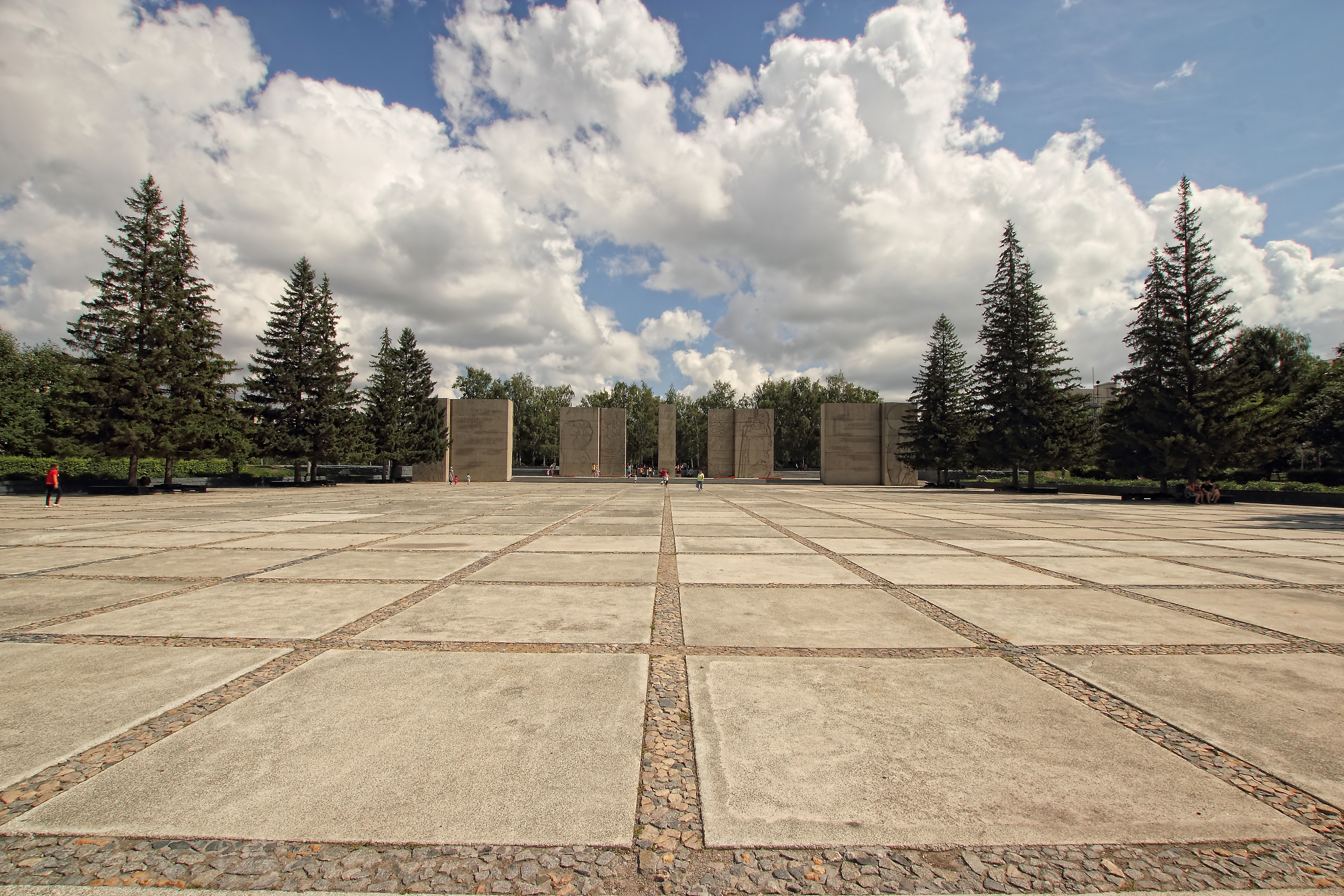 Монумент «Славы», сооруженный в честь подвига сибиряков в годы ВОВ (Новосибирская область, Новосибирск, сквер у кинотеатра "Металлист")